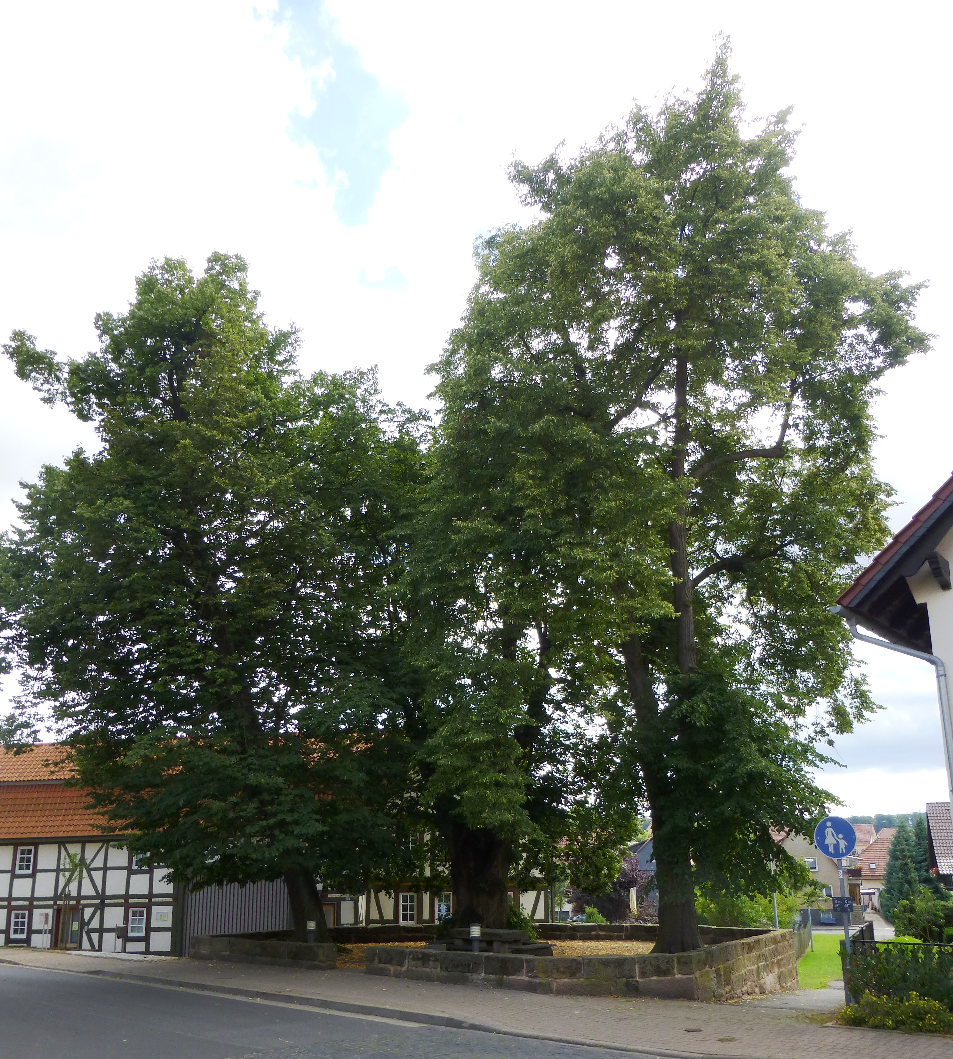 Anger in Günterode, Heilgenstadt, Landkreis Eichsfeld. Mit 3 Linden, Steintisch und Bänken, eingefasst mit niedriger Sandsteinquadermauer